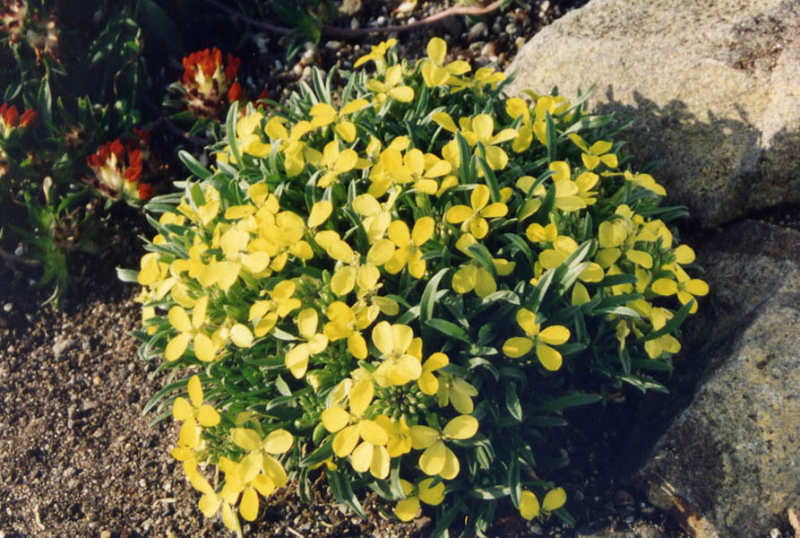 Erysimum pumilum